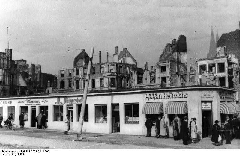 Köln, Gürzenichstrasse, Neue Geschäfte Rund um den Kölner Dom im Jahre 1947. Bild zeigt: Neue Läden an der Gürzenichstrasse. Foto: EDU-Illus